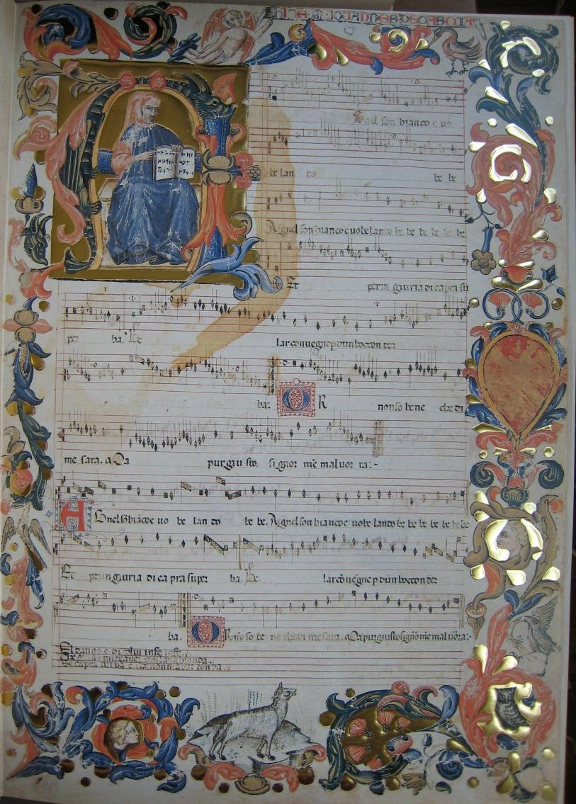 Agnel son biancho e vo belando, Codex Squarcialupi